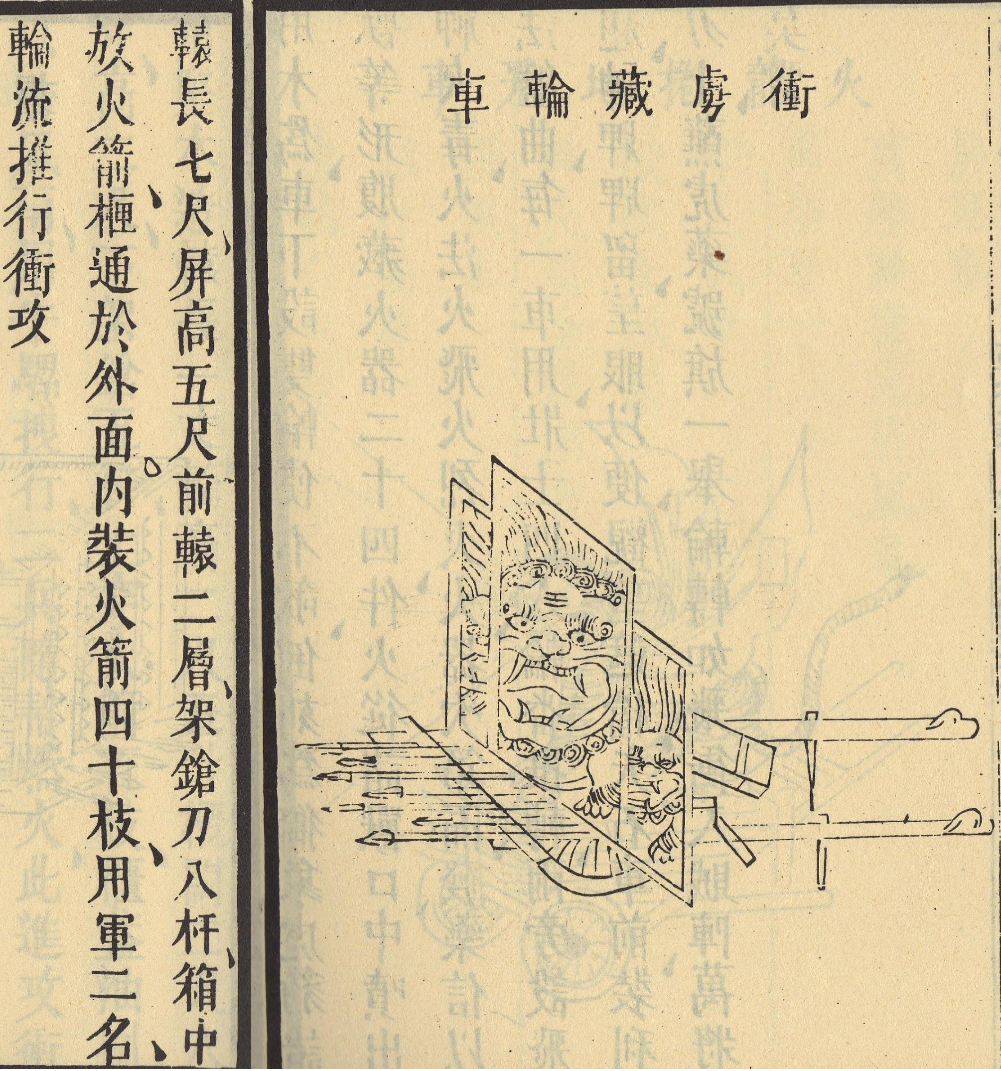 武備志中衝虜藏輪車的圖與文字解說